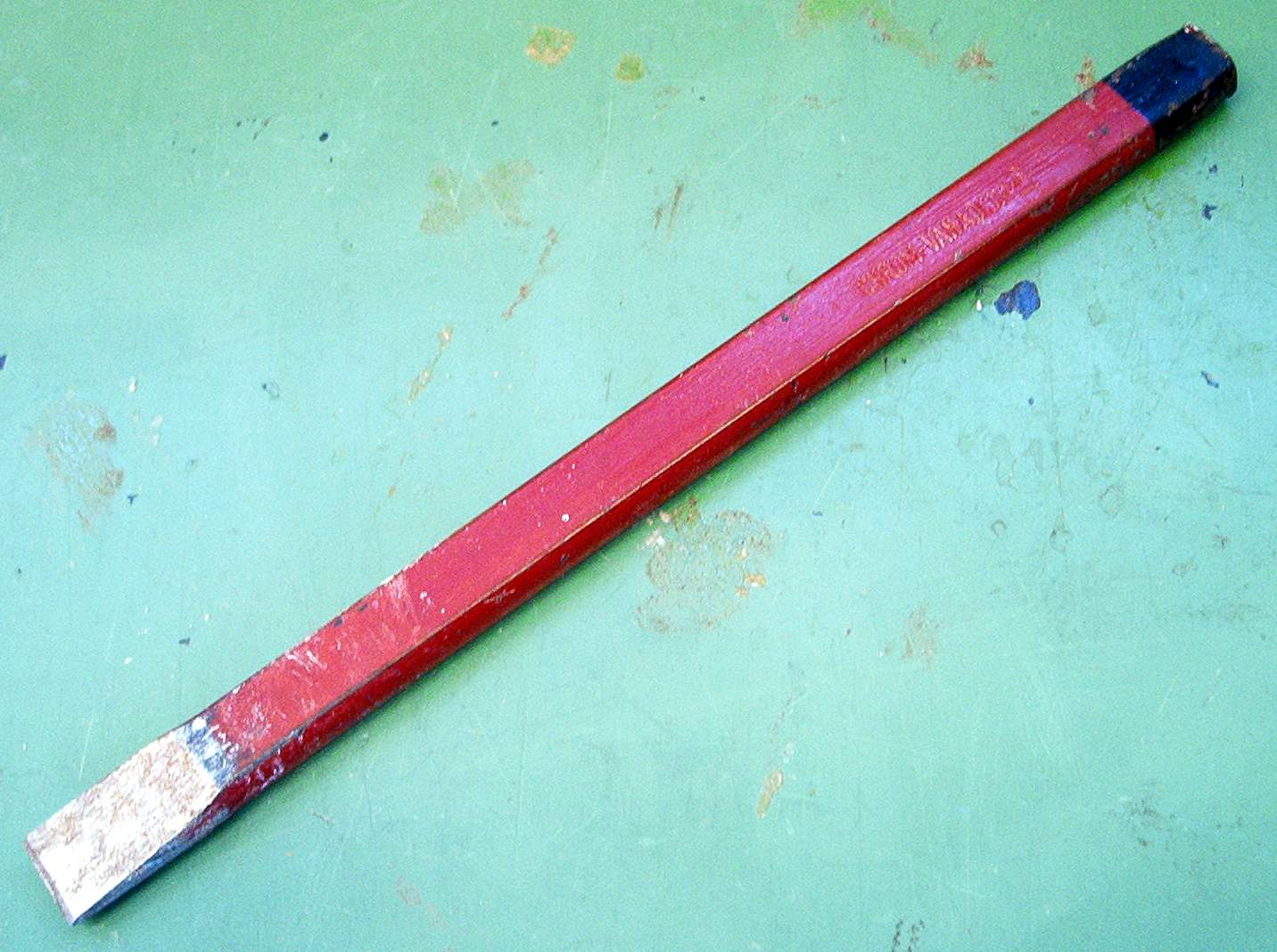 zelfgemaakte foto voor het publiek domein. Martink.